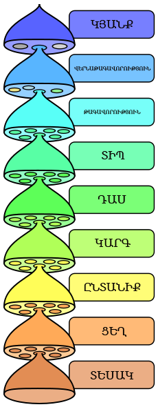 Կենսաբանական դասակարգման աղյուսակ